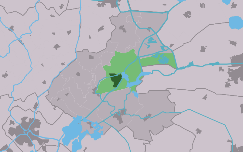 Kaartsje fan himrik fan Grou